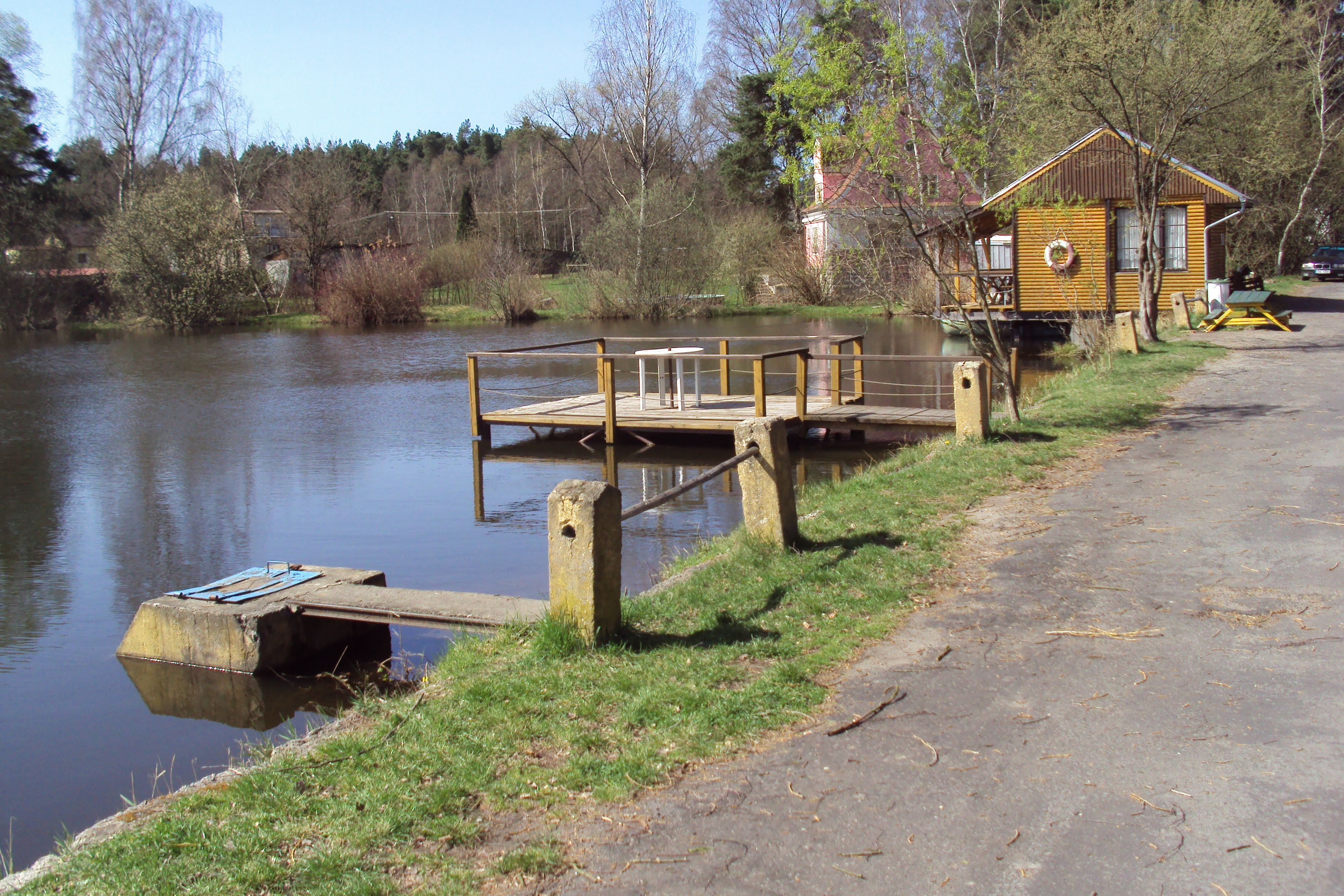 Rybník Pateřinka je rybářským revírem na katastru obce Obora u Doks